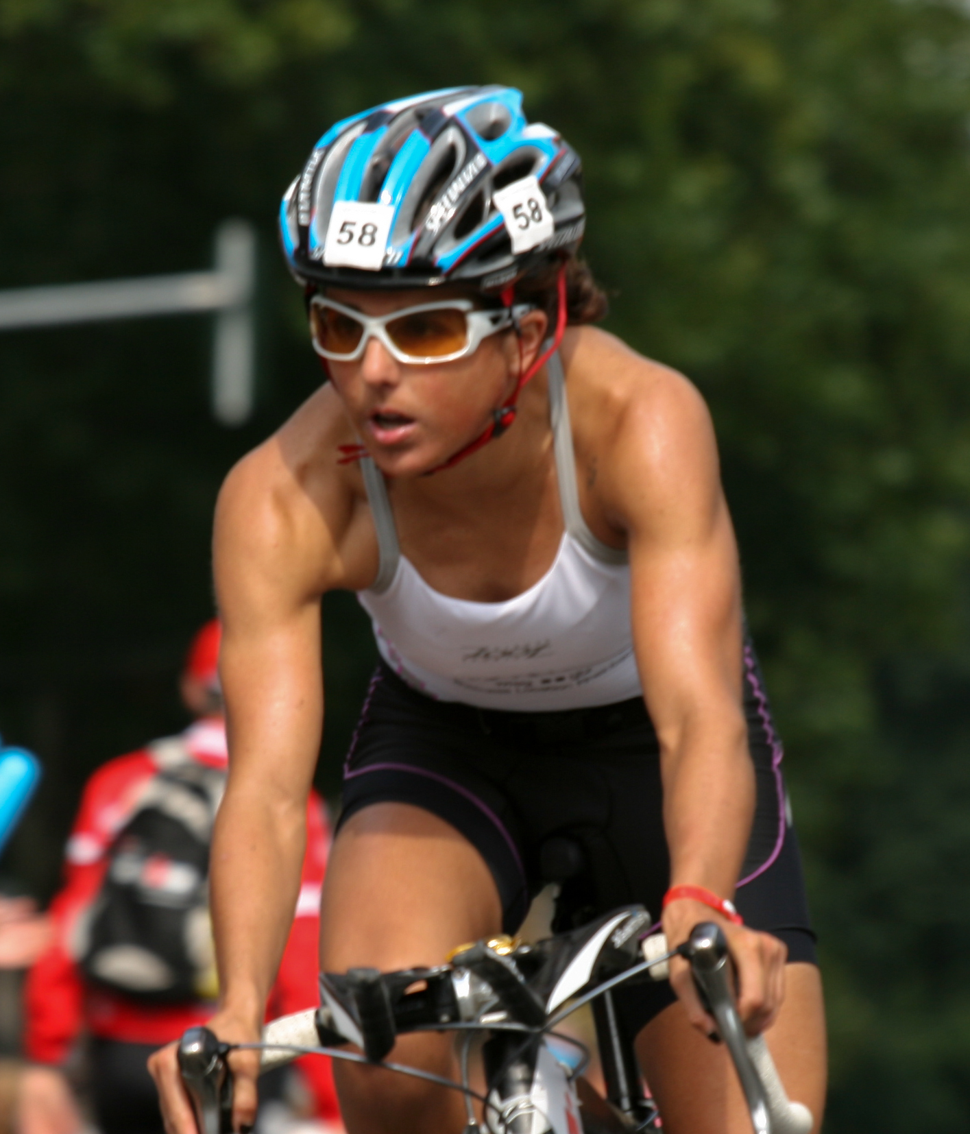 Virginia Berasategui 2007